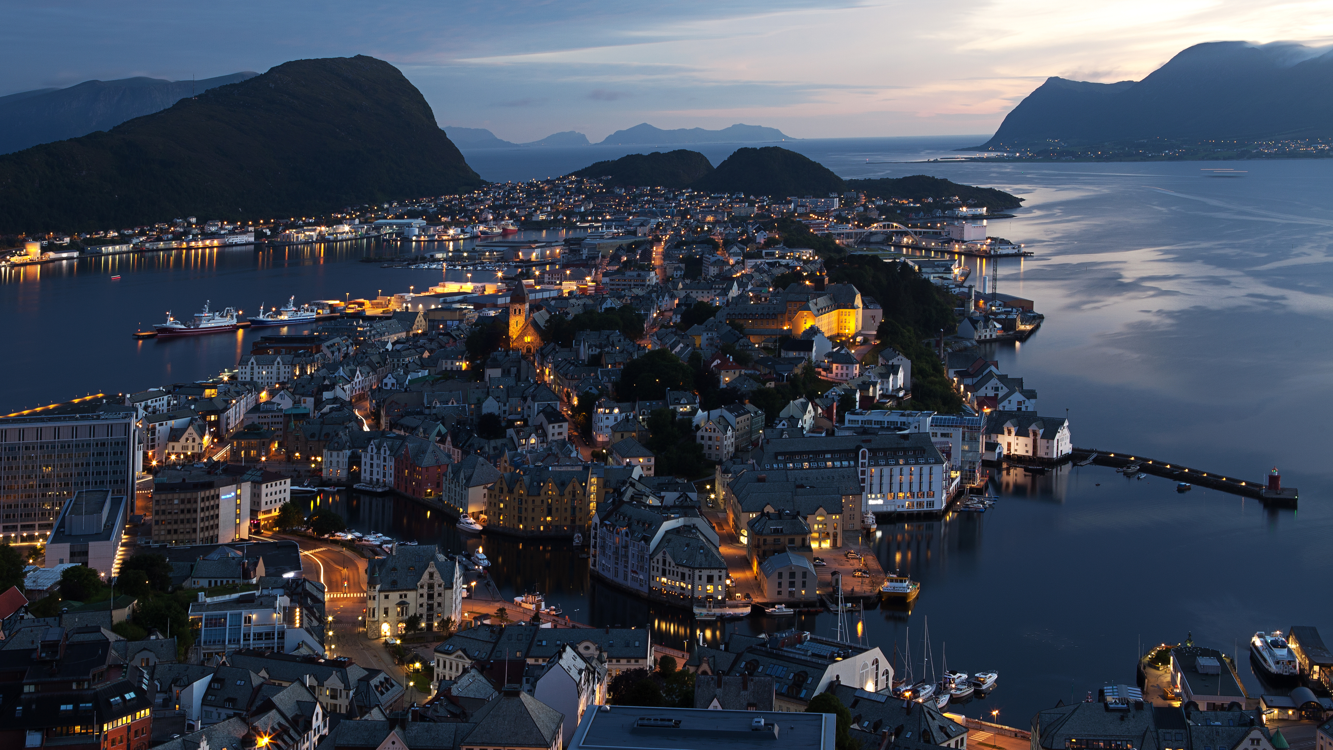 Alesund, nachts vom Berg Aksla